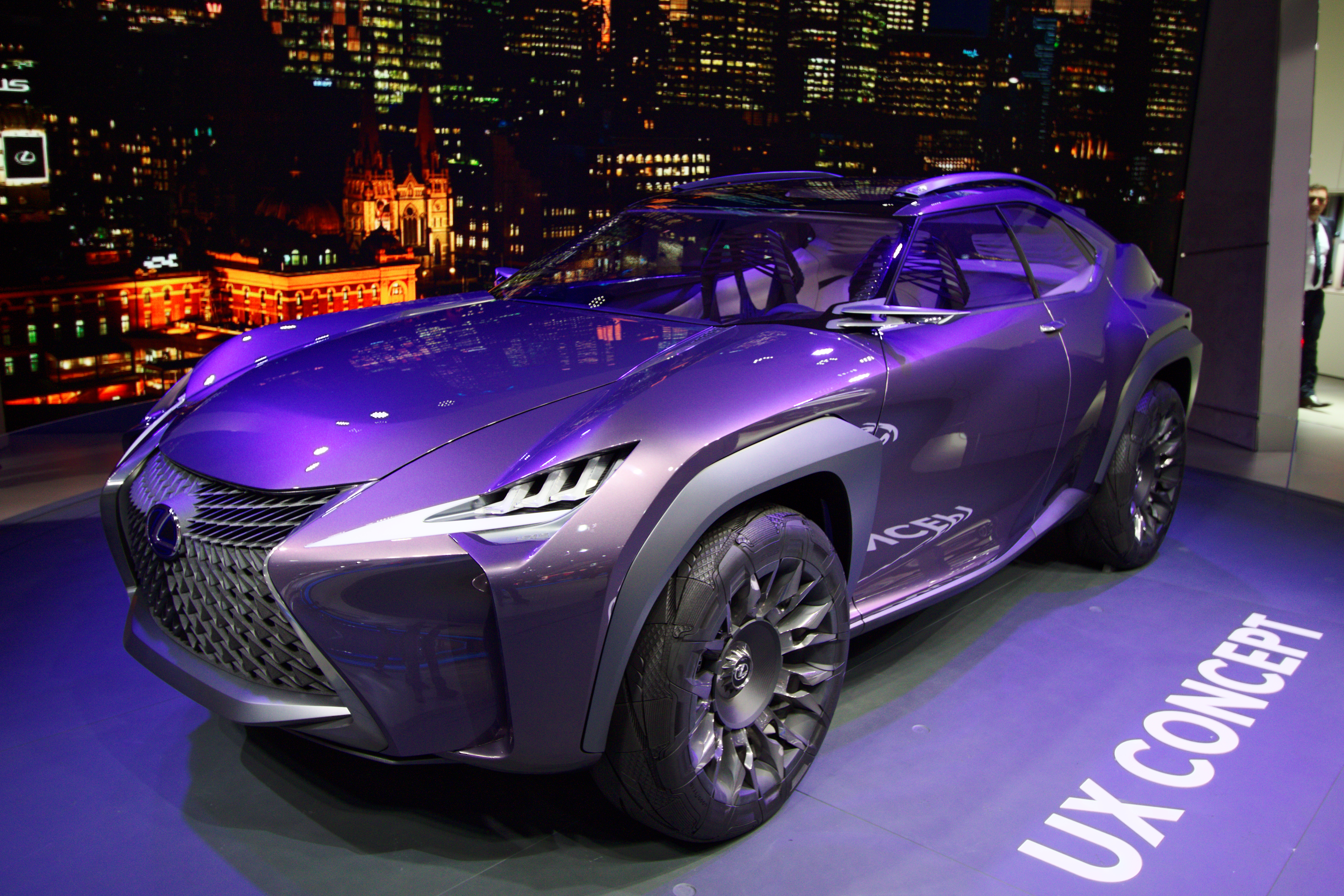 Une Lexus UX Concept présentée lors du mondial de l'automobile de Paris 2016.